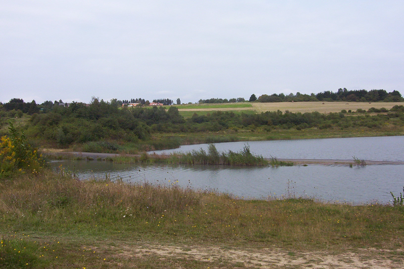 Hahnwiesweiher in Steinertshaus, Illingen, Saarland, Deutschland. Blick auf die Insel am Nordwestufer (2007).